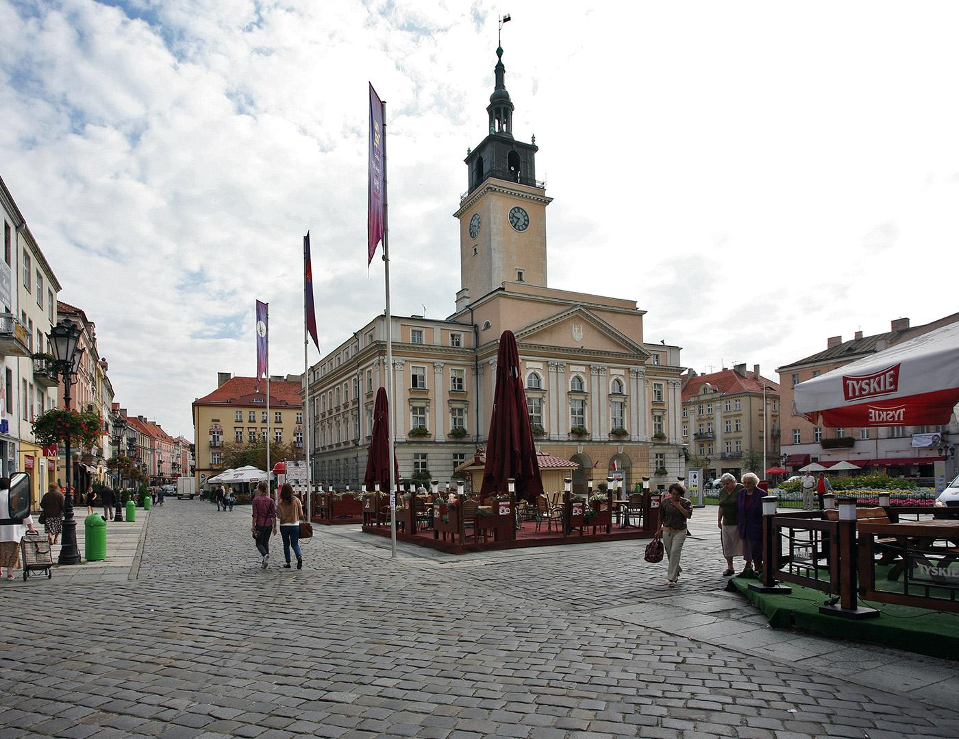 Kaliski ratusz fragmenty rynku. Akurat zdjęcia robione w dzień pracy, przed południem, więc ogródki puste, ale ciesz mnie, że są. Zapewne letnimi wieczorami jest tu przyjemnie. Rynek wyłączony dla ruchu aut.